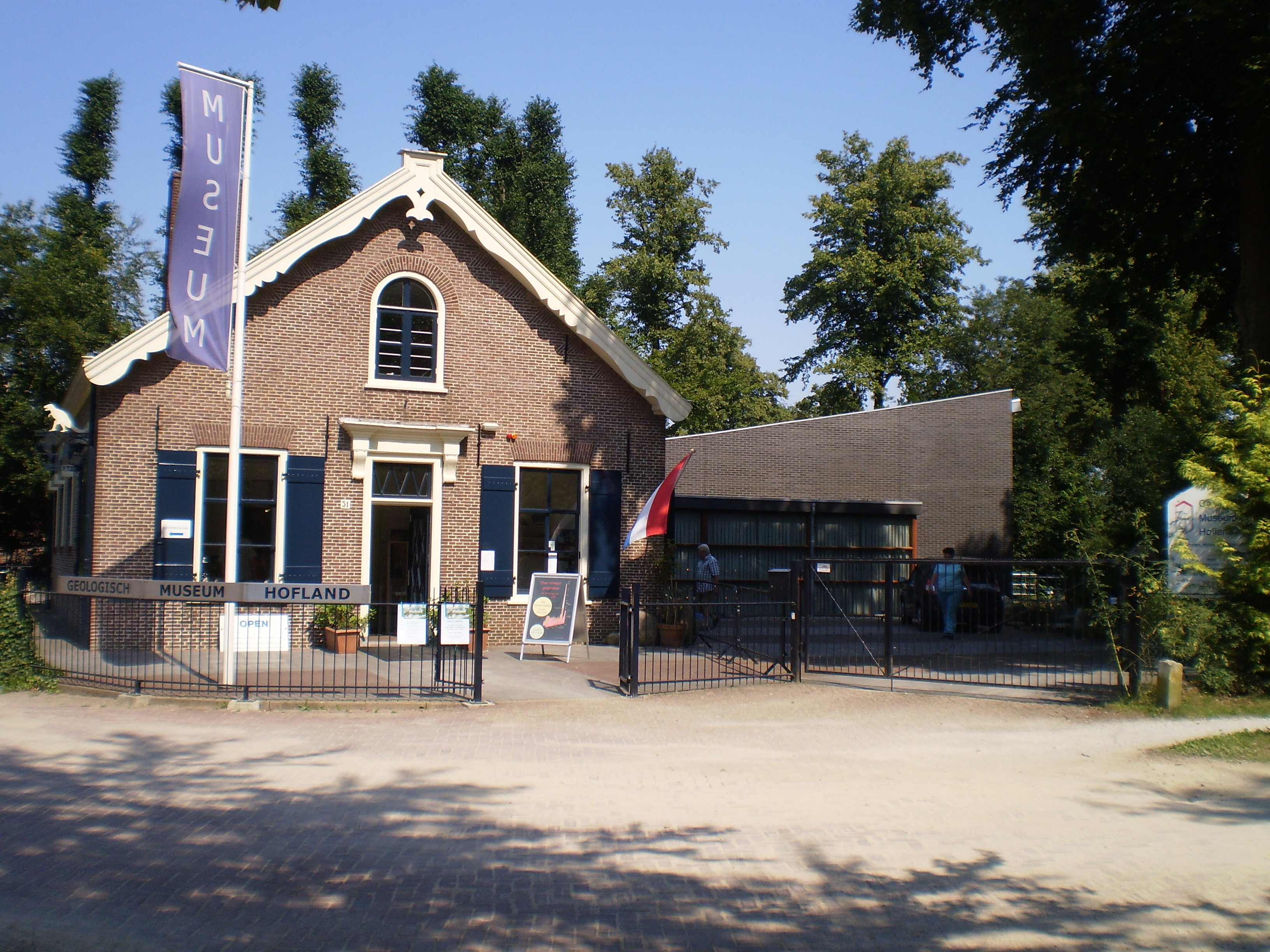 Geologysk Museum Hofland